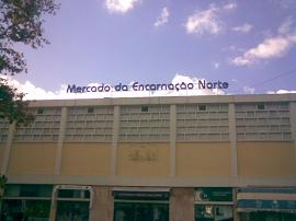 Marcado da Encarnação Norte, Bairro da Encarnação, Lisboa